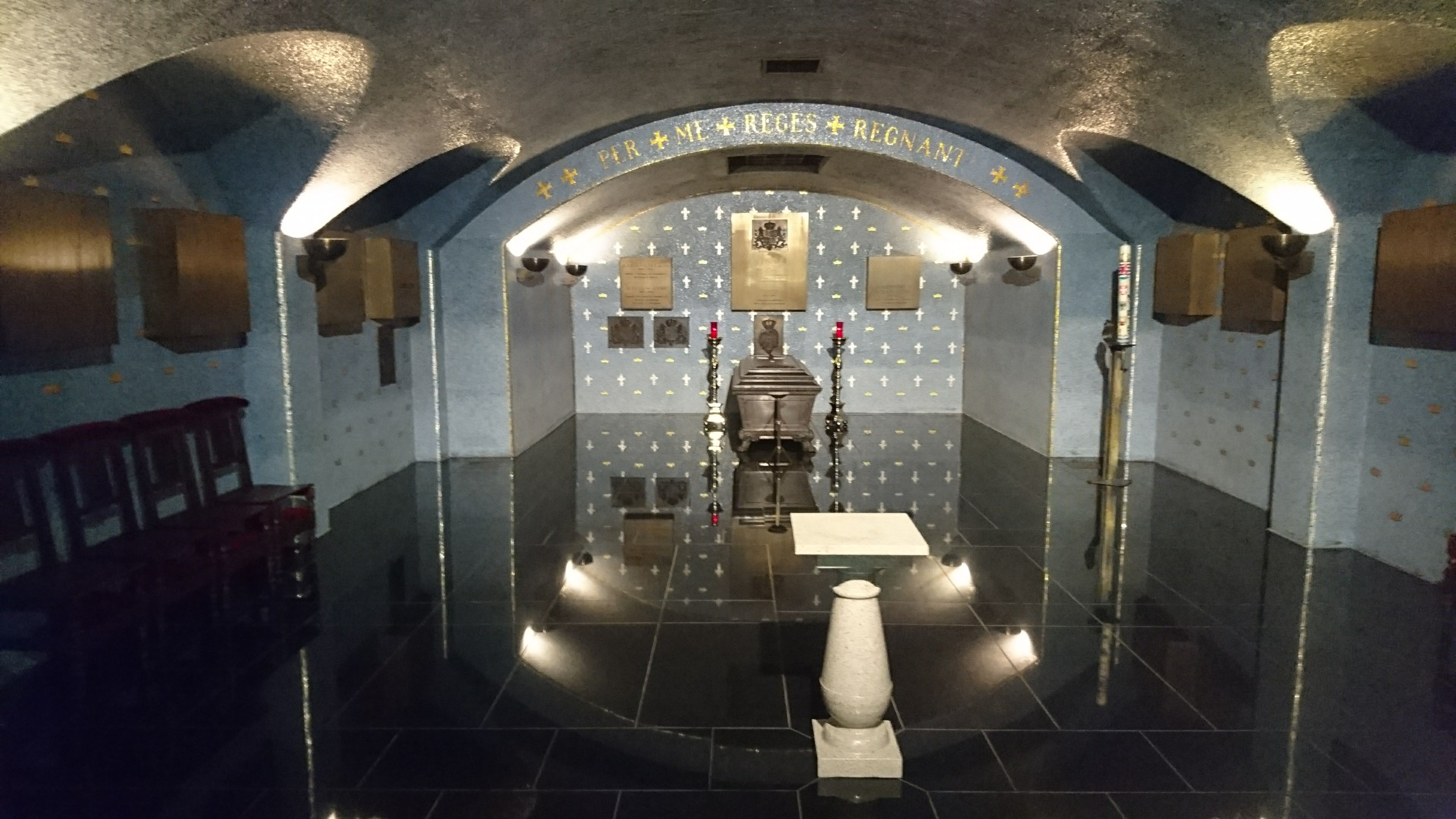 Důstojná hrobka Jana Lucemburského, českého krále a hraběte lucemburského (katedrála Notre-Dame, Lucemburk).